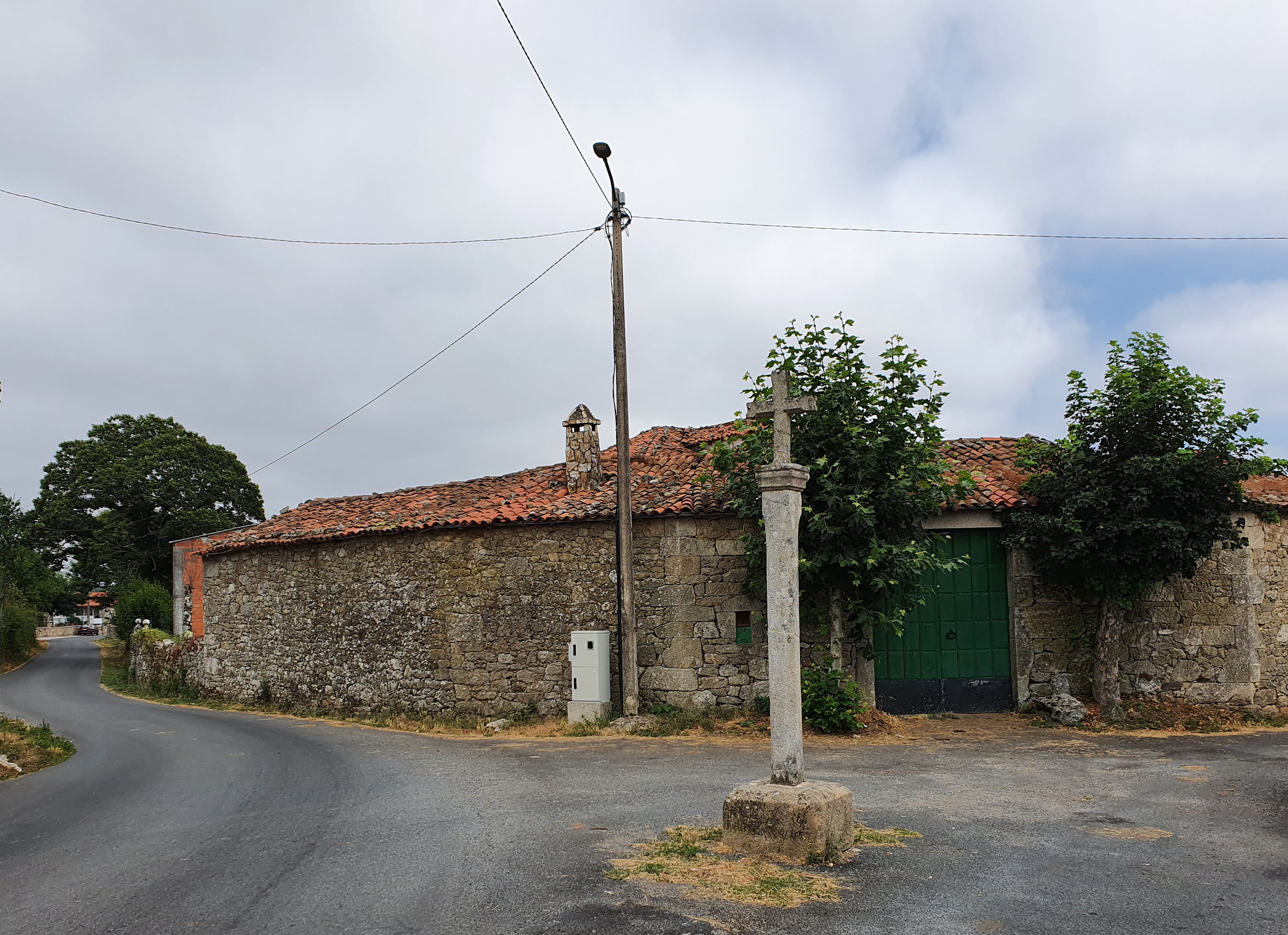 Lugar de Campo, na parroquia de Dorra en Antas de Ulla (Lugo). Ubicado moi perto da Igrexa parroquial, ata aquí faise a procesión rodeando o cruceiro de cruz latina a vara poliédrica. Moita vida deu a iluminación pública ao rural; mágoa que o cableado que lle leva a enerxía aínda non se valorou a opción de o conducir agredindo algo menos os magníficos entornos...